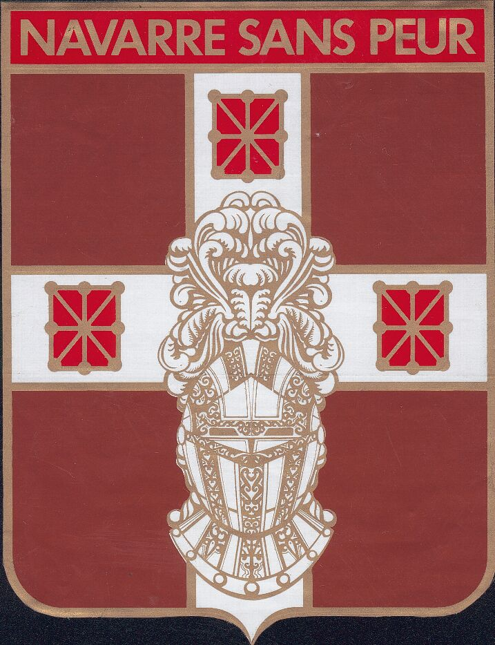 Insigne régimentaire dernier modèle du 5e Régiment d'infanterie.